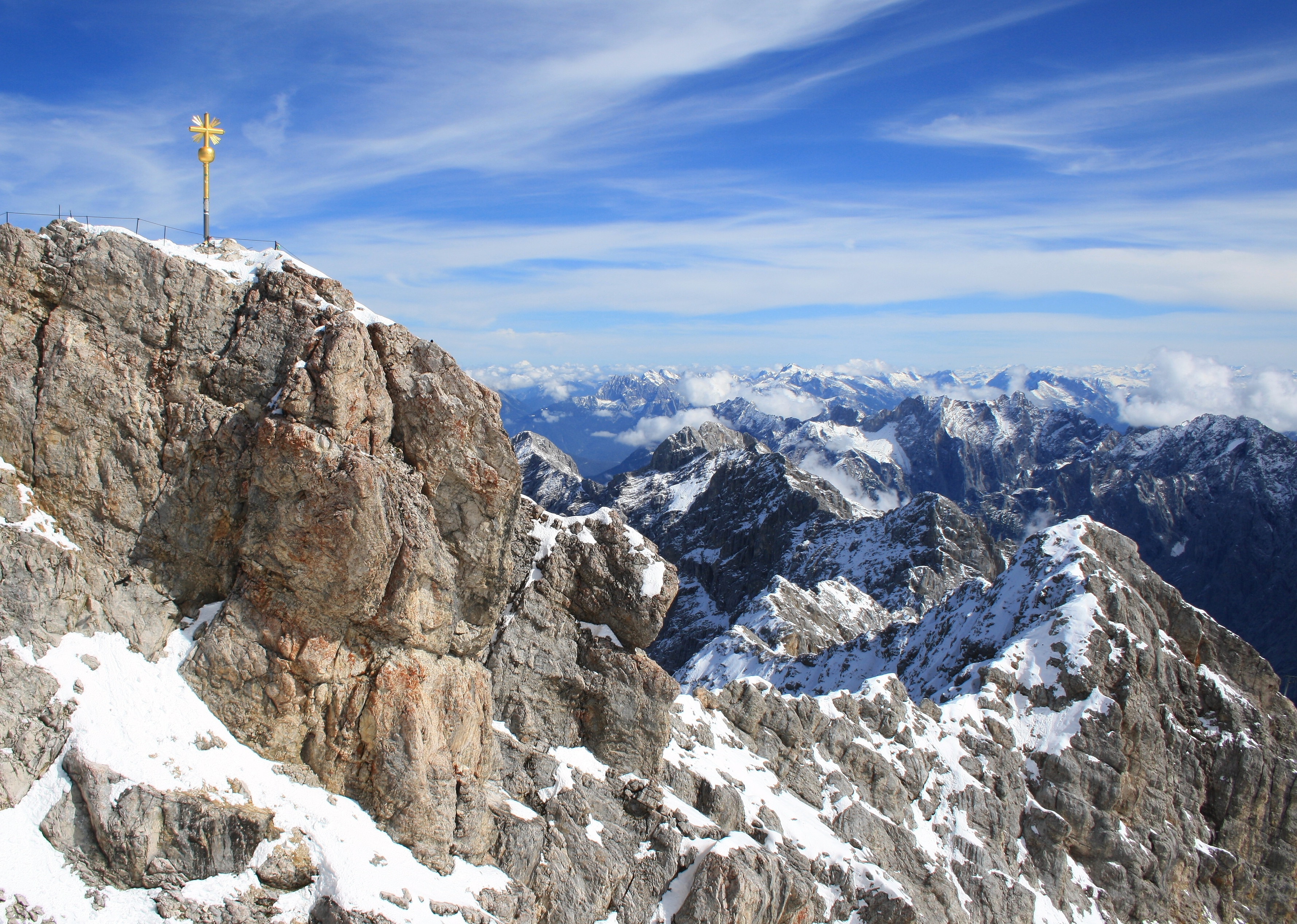 Gipfel der Zugspitze mit Gipfelkreuz (die Zugspitze und ihe Umgebung in Deutschland gehören zum Landschaftsschutzgebiet „Wettersteingebiet einschließlich Latschengürtel bei Mittenwald“) – welche(s) Gebirge ist im Hintergrund zu sehen?